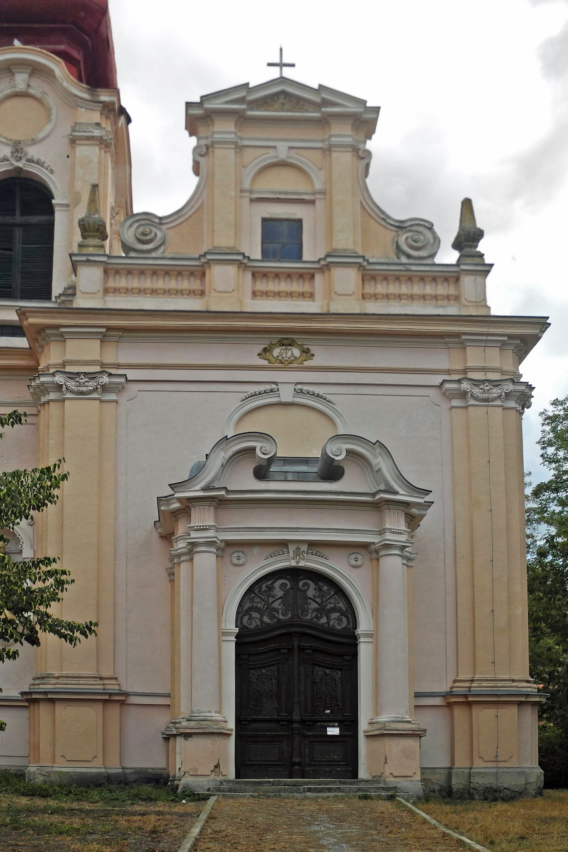 Portal der Dreifaltigkeitskirche in Aussig-Obersedlitz (Kostel Nejsvětější Trojice Kramoly/Novosedlice), jetzt Ústí-Střekov, Jeseninova, erbaut 1903, Architekt: Max von Loos